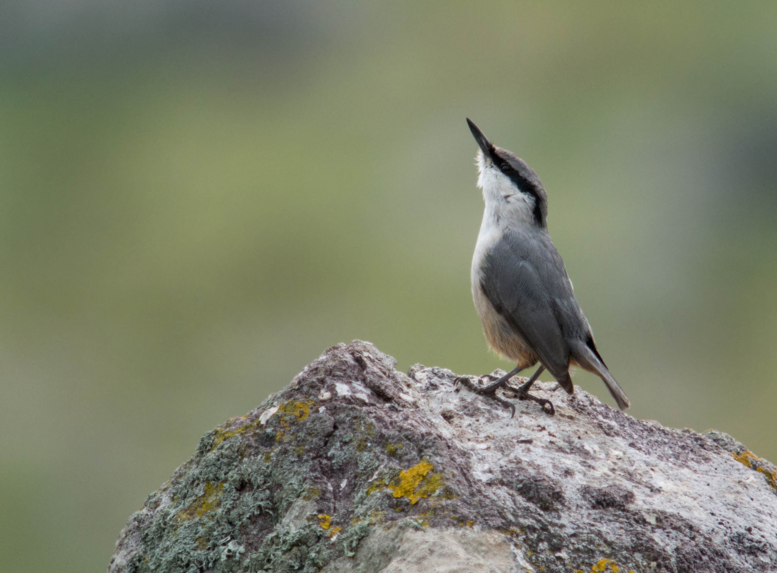 Digiscoping with Swarovski ATM 80 HD 30 X, Nikon 1V1 + 11-27,5 mm lens (Adapter DCB)